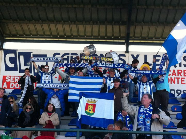 Durante el duelo en Mora